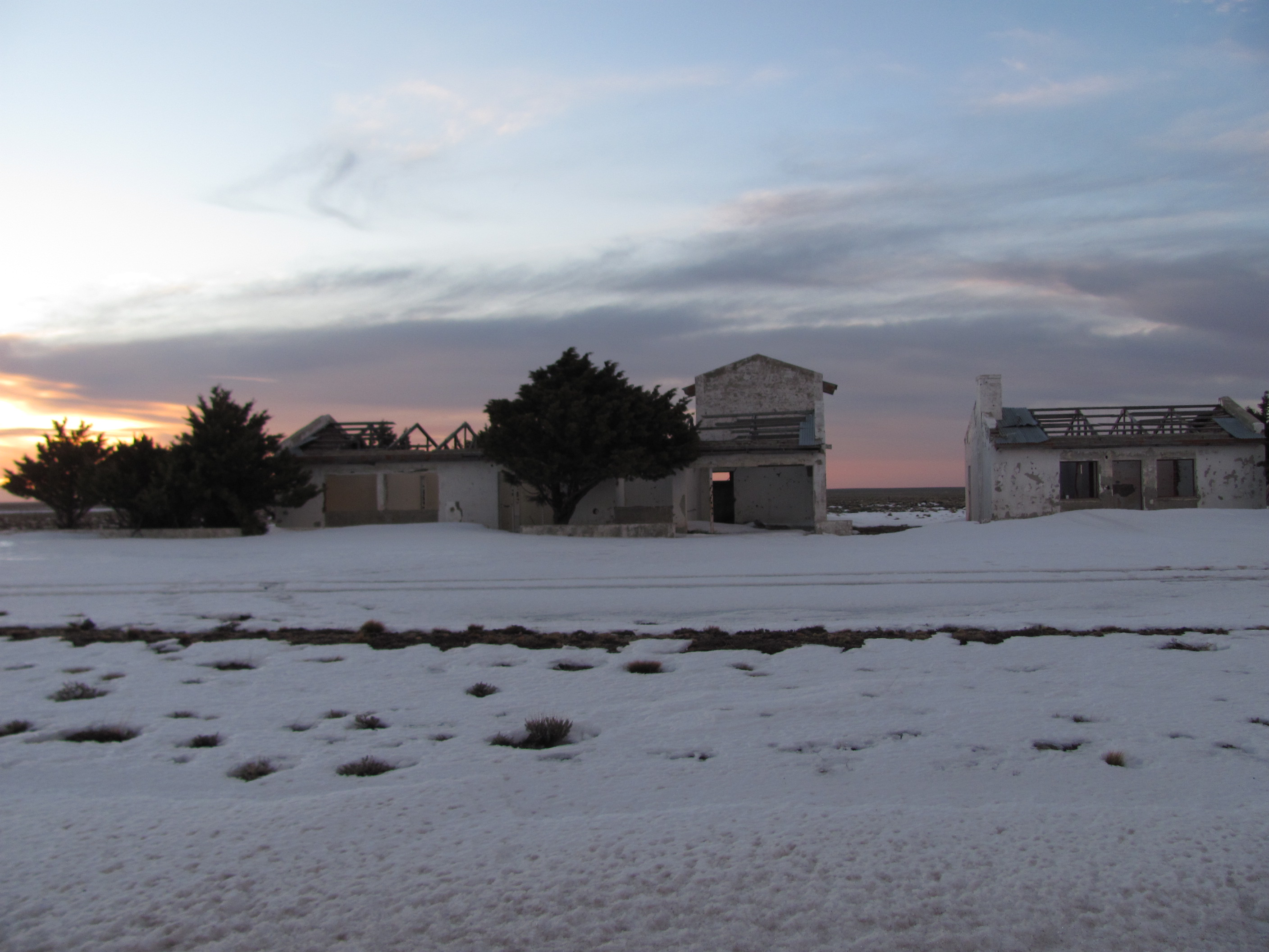 Vista de edificios destruidos en la zona de la estación Holdich